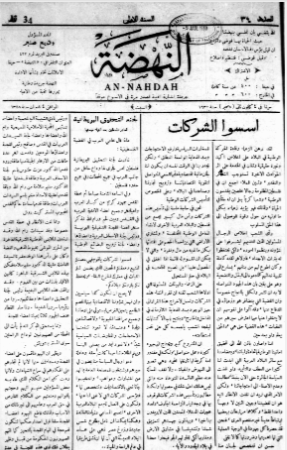 جريدة أدبية إخبارية فلسطينية كانت تصدر في حيفا